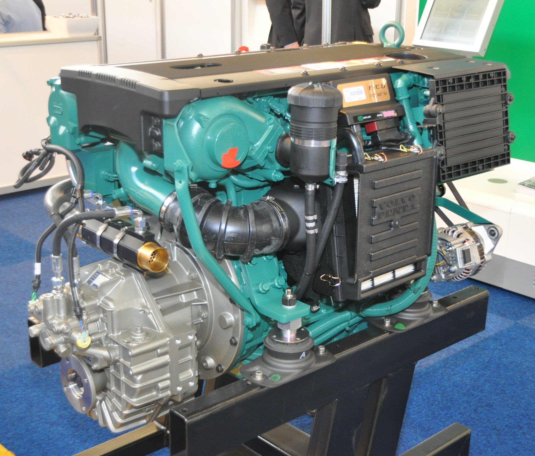 Volvo Penta 132kW diesel motor op de METS 2011 in de RAI te Amsterdam Motor D4-180I-E Productie periode 2010- Operation 4-slag Cilinder configuratie 4 Diameter (mm) 103 Slag (mm) 110 Compressie verhouding 17,51:1 Inhoud (liters) 3,7 Vermogen (pk) 180 Max. motortoerental (rpm) 2800